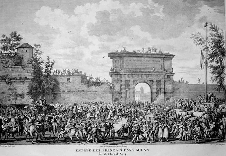 Carle Vernet (1758-1836) - Entrée des français dans Milan le 25 Floréal an 4 - tiré des: Campagnes des Français - Consulat & l'Empire, Paris 1820.